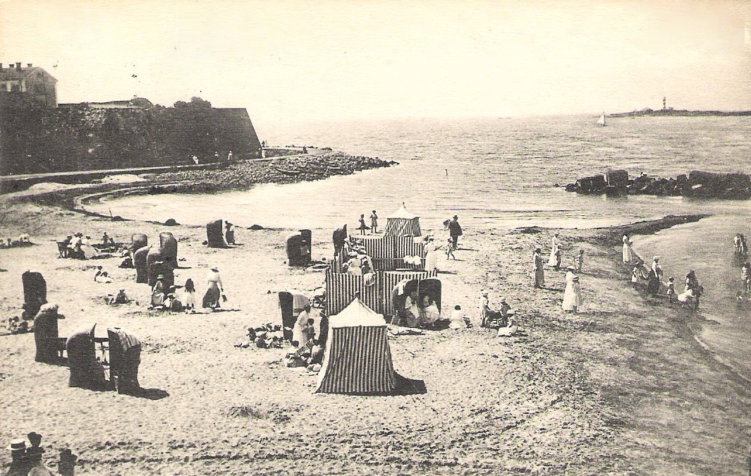 Varbergs havsbad, Badstranden, tidigt 1900-tal. Vykortet är poststämplat i Stocksund 18 augusti 1916. Foto och förlag: Mathilda Ranch.